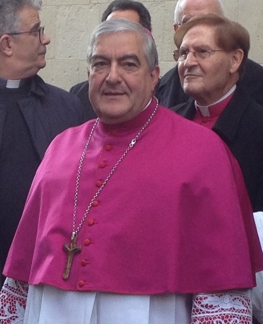 Primo piano Arcivescovo Michele Seccia